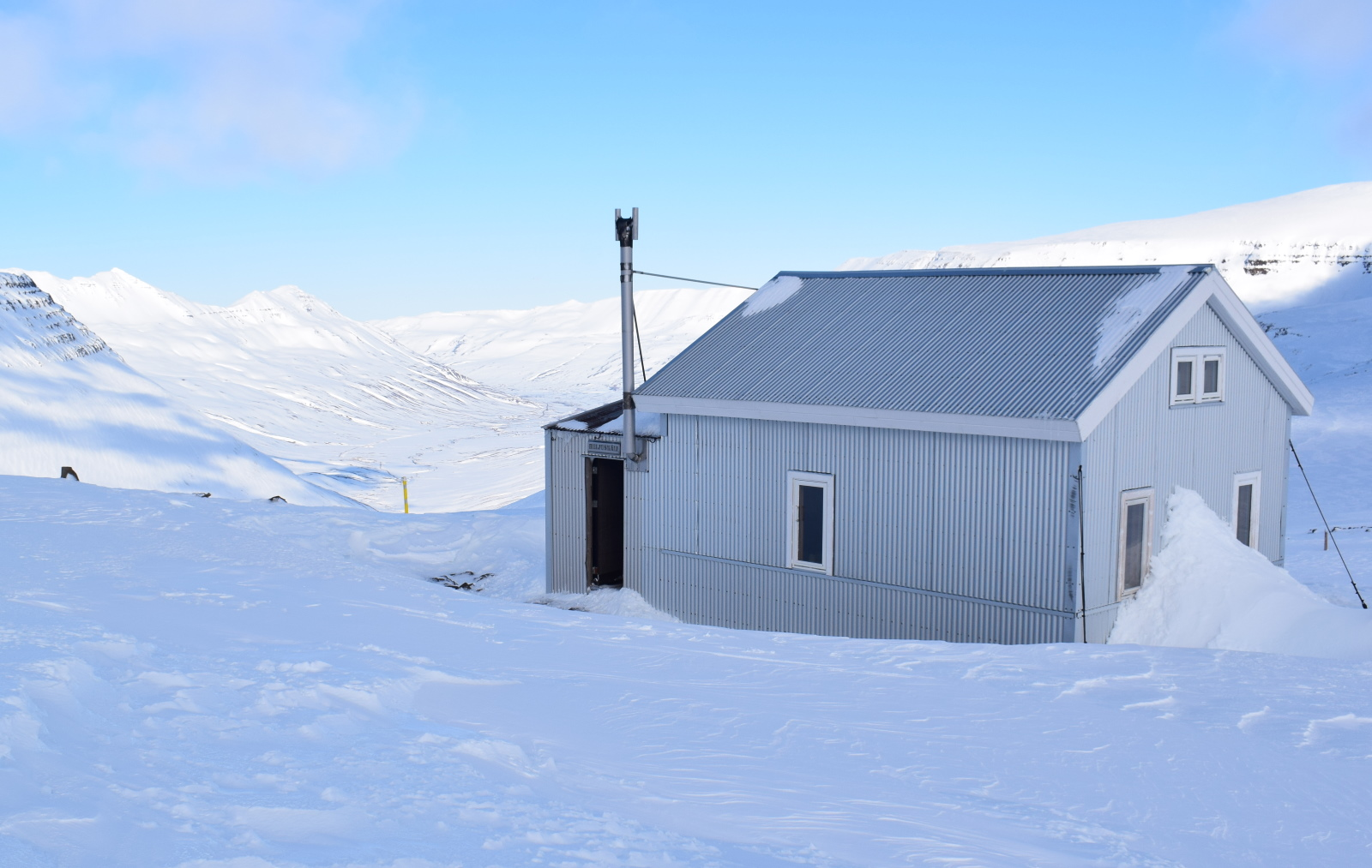 Heljuskáli er sæluhús sem er í eigu Ferðafélags Svarfdæla